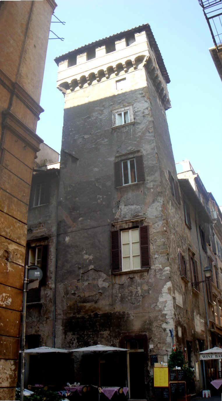 Roma, Tor Millina (Parione)